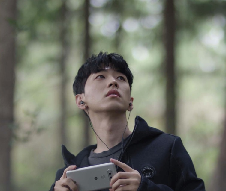 ■ LG V20로 나만의 힙합 음악 만드는 ‘플레이 위드 그레이’ 인기몰이 □ 인기 힙합 프로듀서 그레이가 V20로 만든 음원에 랩과 노래를 직접 만들어 소개 □ 그레이가 V20로 음악 만드는 영상, 한 달 만에 조회수 400만 건 돌파 □ 개성 넘치는 응모작 300여 건 … 높은 완성도에 전문가도 놀라 ■ V20의 최고의 오디오 성능과 재미있는 편의 기능에 호평 □ 고음질 마이크, 하이파이 비디오 레코딩 기능 등 최상의 멀티미디어 경험 제공 ■ LG전자 한국모바일그룹장 이상규 전무, “LG V20의 뛰어난 멀티미디어 성능을 쉽고 재미있게 즐길 수 있는 다양한 체험기회를 만들어 갈 것” ※ Social LG전자 ( 에서 관련 보도자료를 확인하실 수 있습니다.